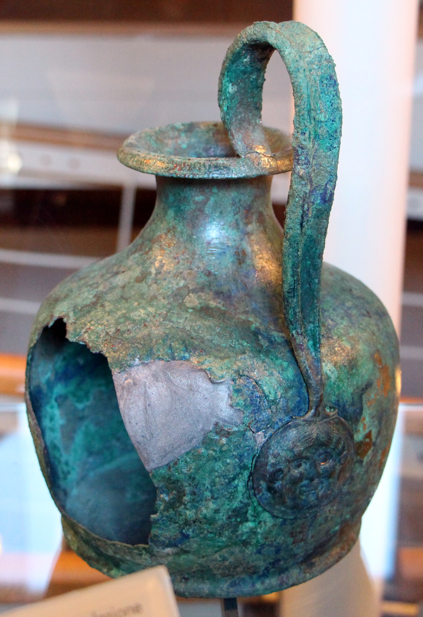 Museo di Asciano